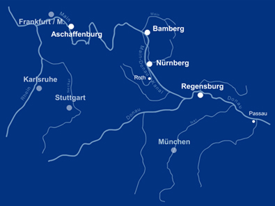 Übersicht der Standorte der bayernhafen Gruppe